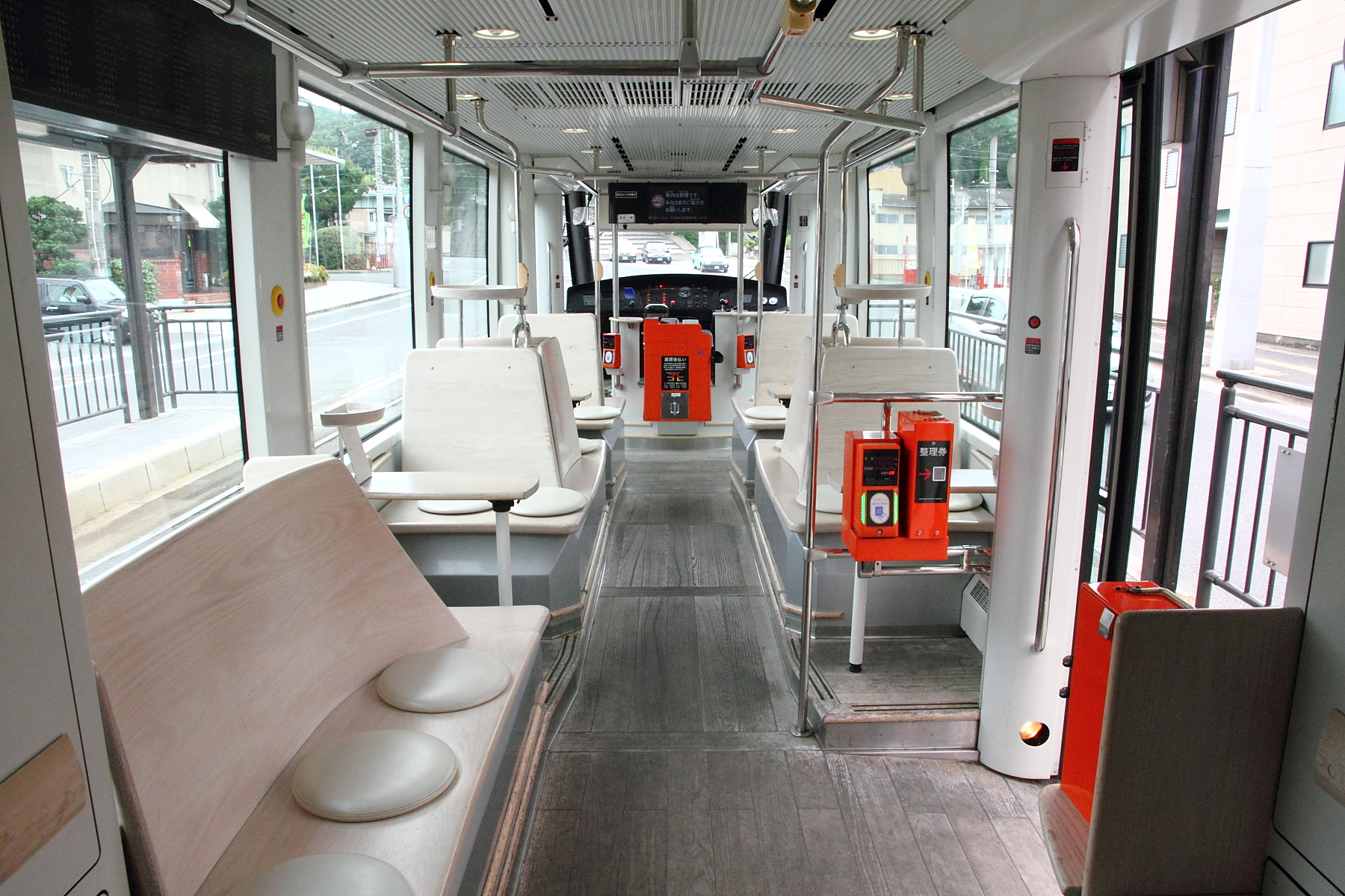 岡山電気軌道9200形1011Bの車内。連結部側から運転台側に向って撮影。内装の使用材木はホワイトアッシュ材。